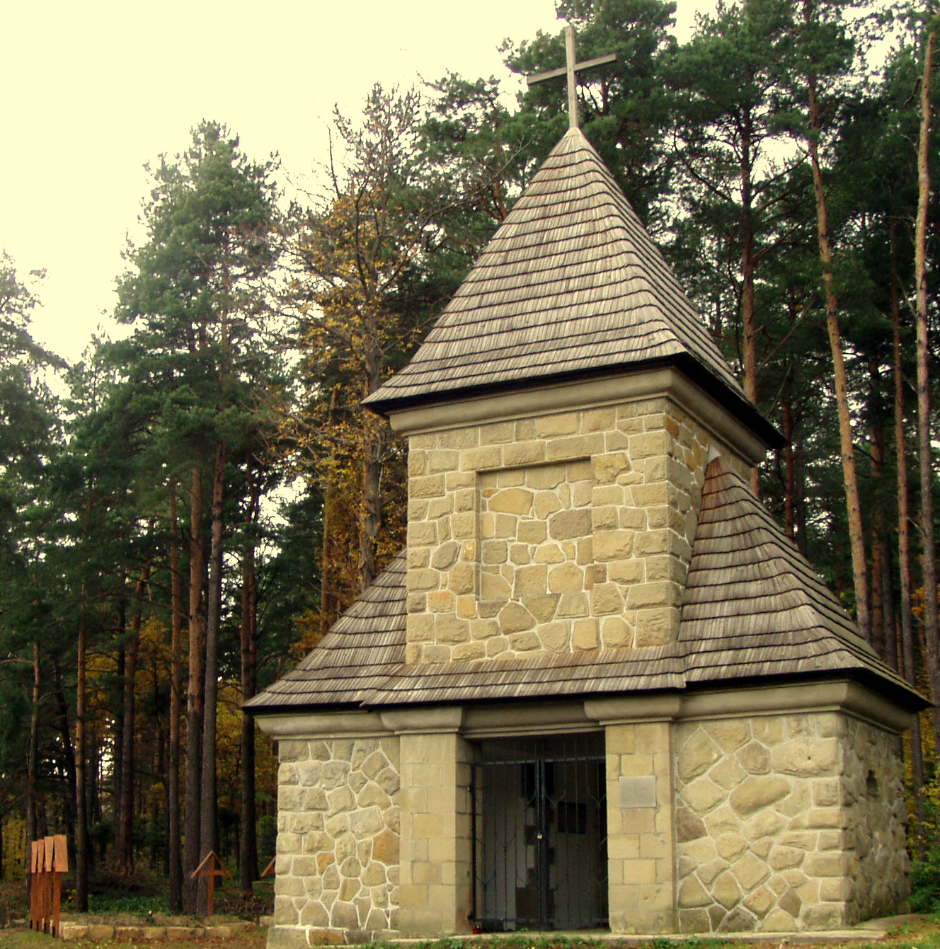 Cmentarz wojenny nr 14 w Cieklinie